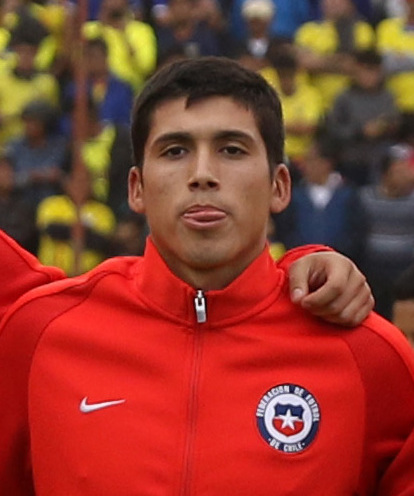 Ambato, Ecuador, 22 enero 2017 (Andes).- Ecuador igualó 1-1 este domingo con Chile en la ciudad de Ambato y dejó vivas las posibilidades de clasificar a la fase final del Campeonato Sudamericano Sub 20 del que es anfitrión, y se alista desde ya para jugar con Paraguay en la última jornada, el jueves próximo, en la ciudad ecuatoriana de Ríobamba. ANDES/Micaela Ayala V.